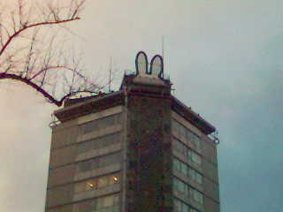 Neudeflat met Nijntje-oren. Foto 23 feb 2006. Eigen werk.